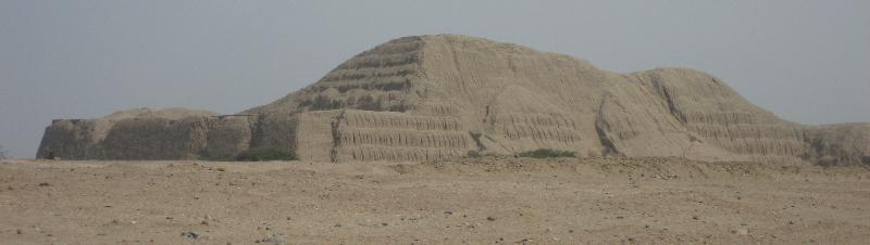 "Huaca del Sol", La Libertad, Peru.